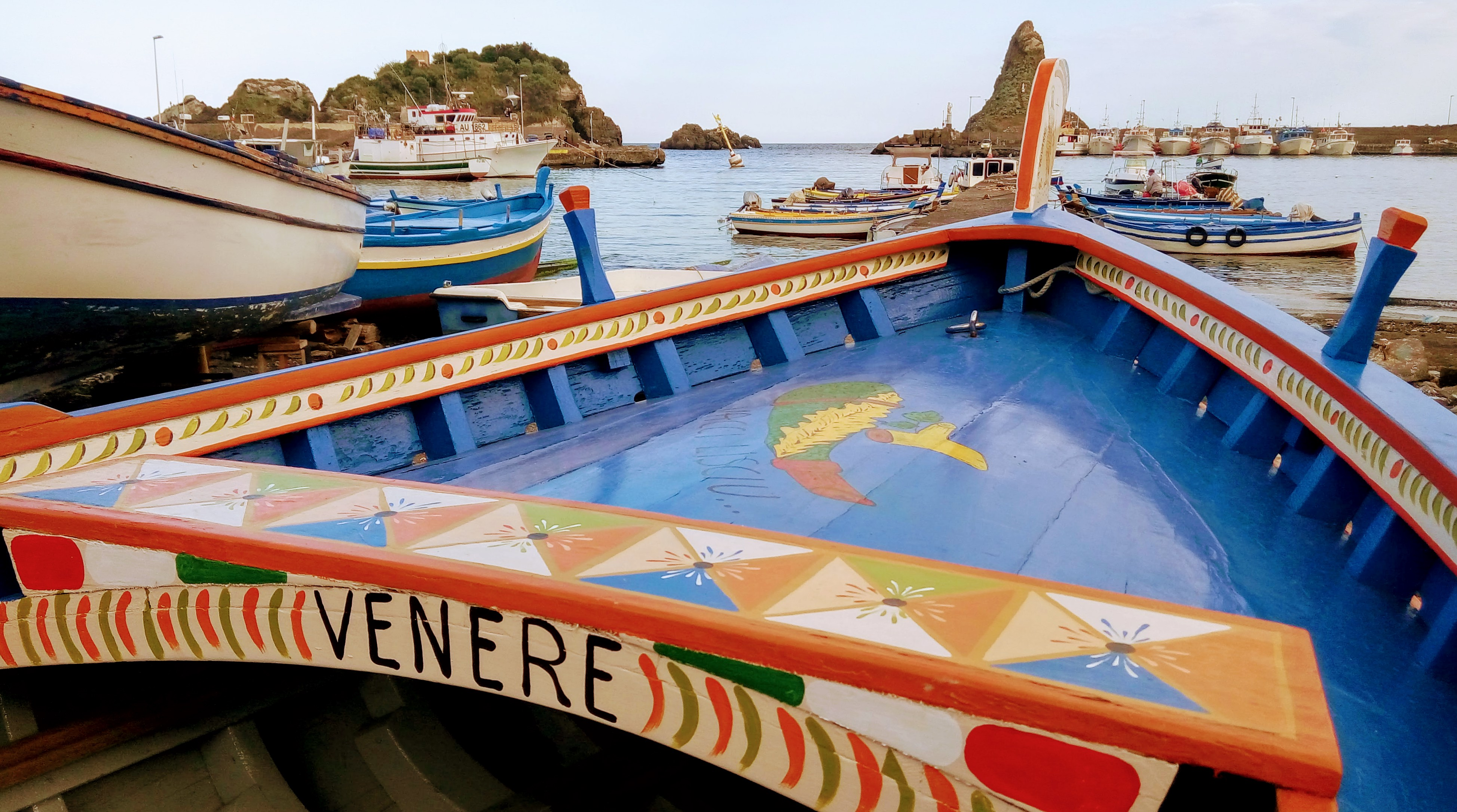 Gozzo tipico trezzoto decorato da un artista pingi santi.